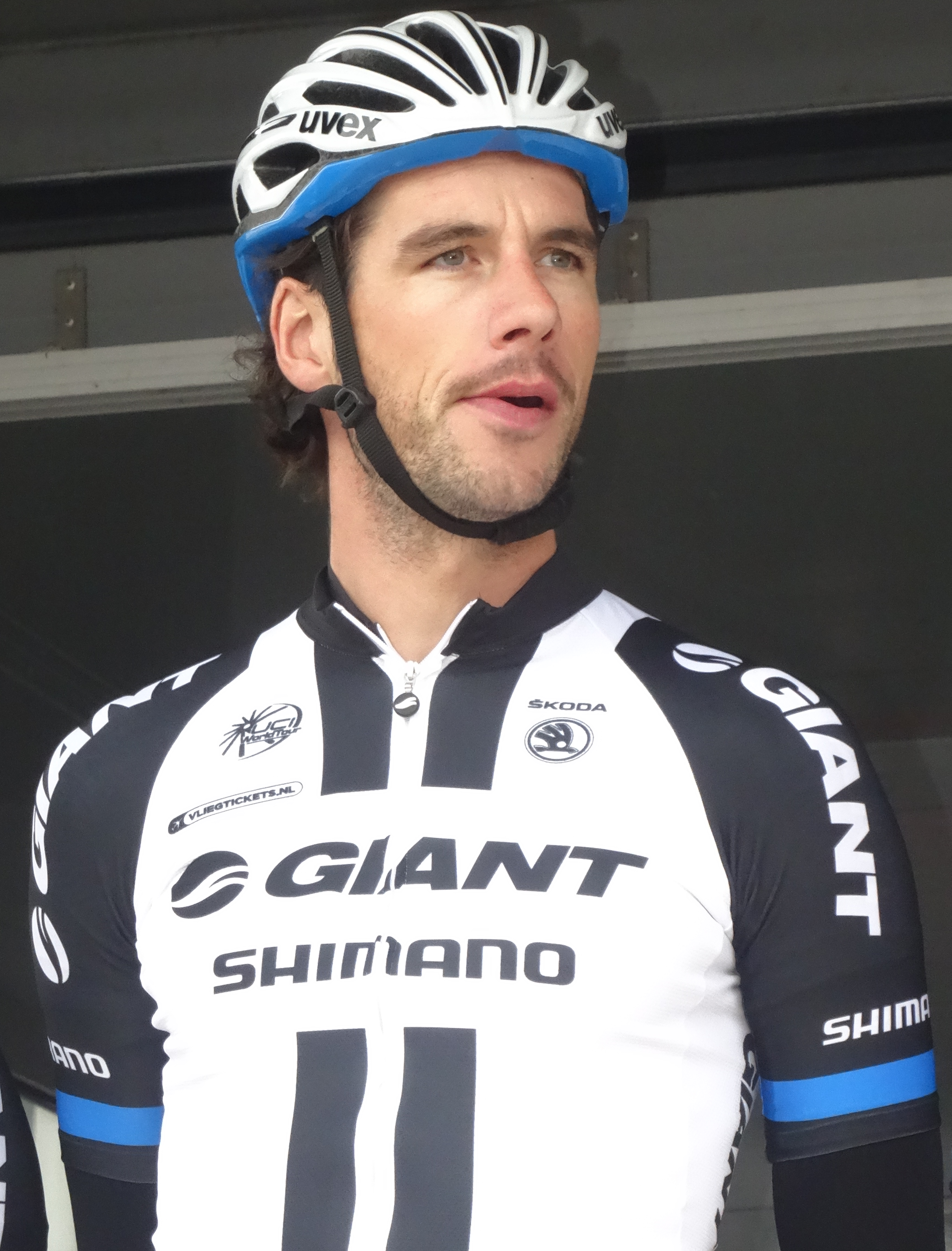 Reportage photographique réalisé le mercredi 24 septembre à l'occasion du départ et du début de la course du Circuit du Houtland 2014 à Lichtervelde, Belgique.